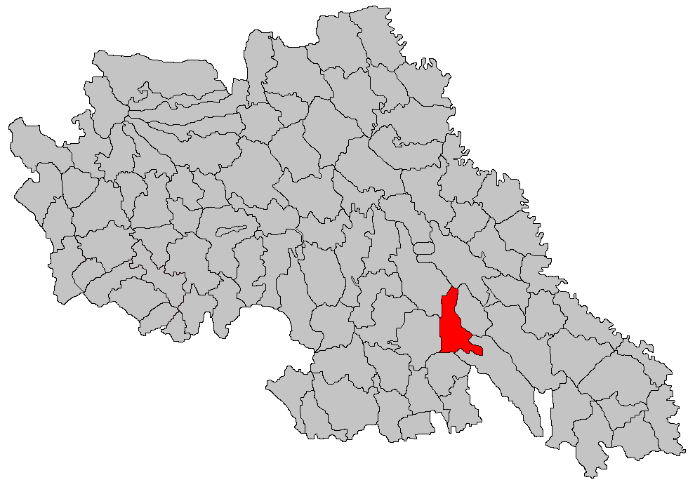 Categorie:Hărţi ale judeţului Iaşi